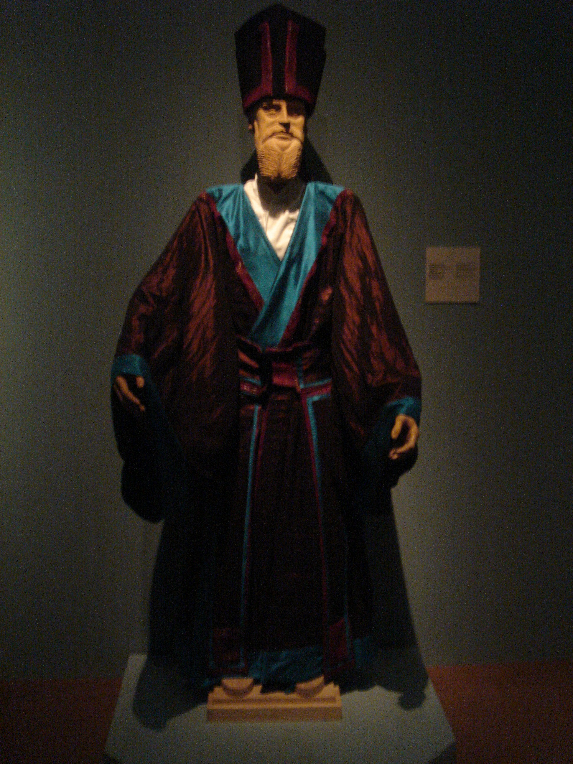 利玛窦在韶州时所穿的儒服，藏于意大利马切拉塔艺术学院，摄于北京首都博物馆